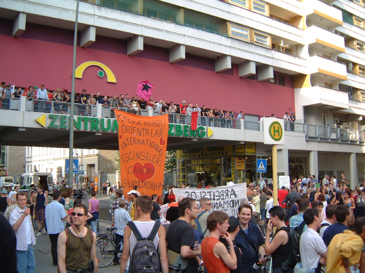 Transgenialer CSD, 2003 in Berlin